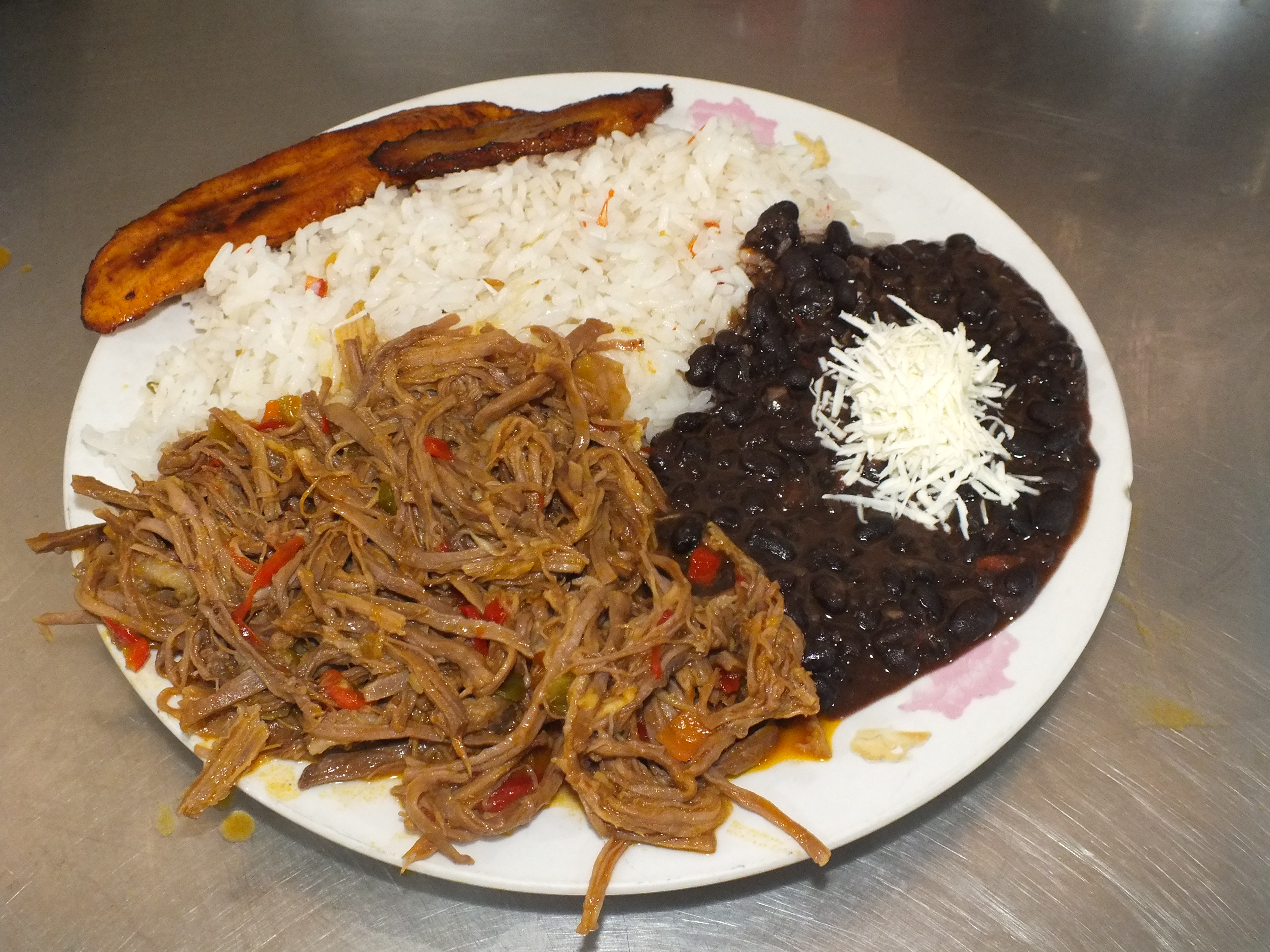 Consta de Caraotas Negras, Arroz, Carne Mechada, Tajadas y Queso.